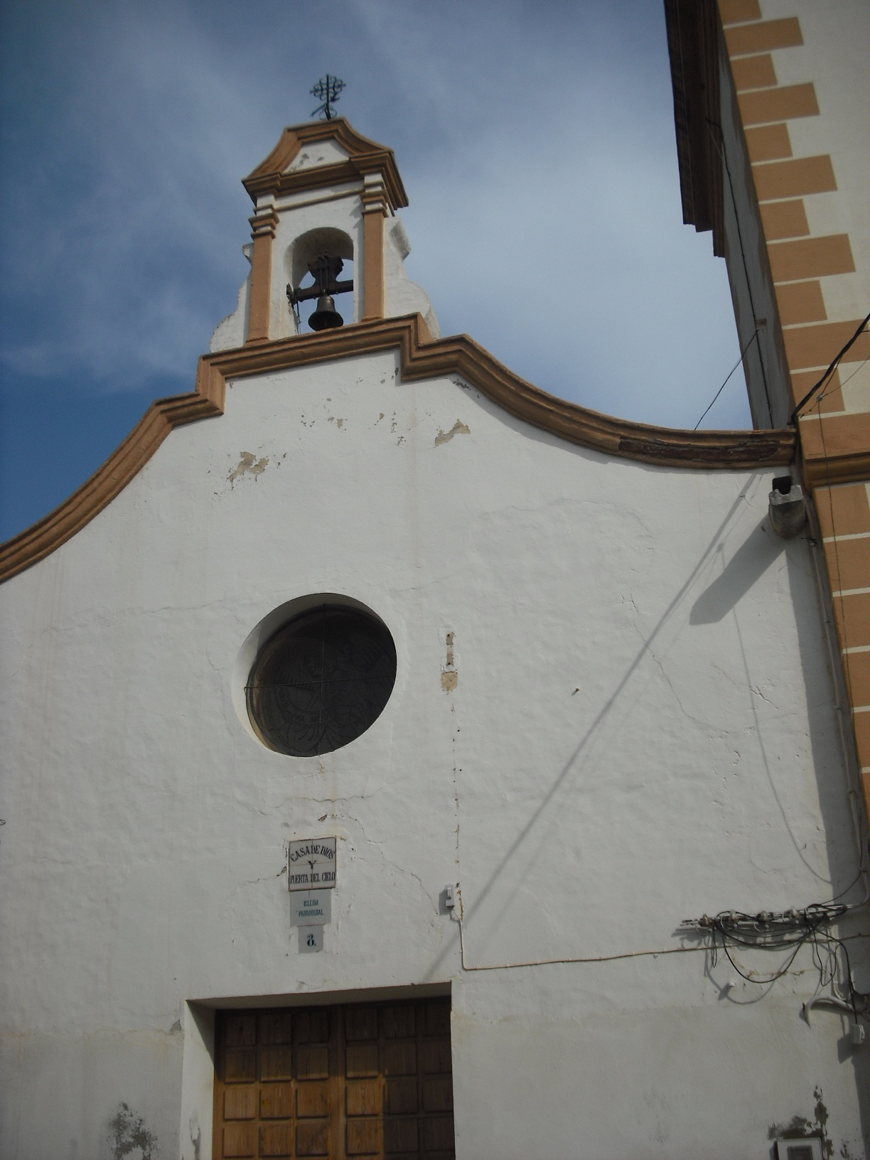 Portada de l'església de Mascarell (Nules).